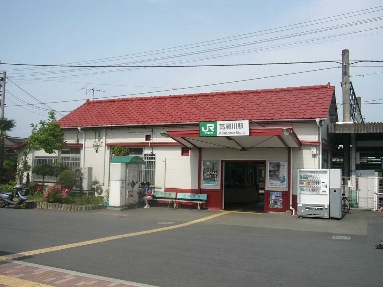 Komagawa Station